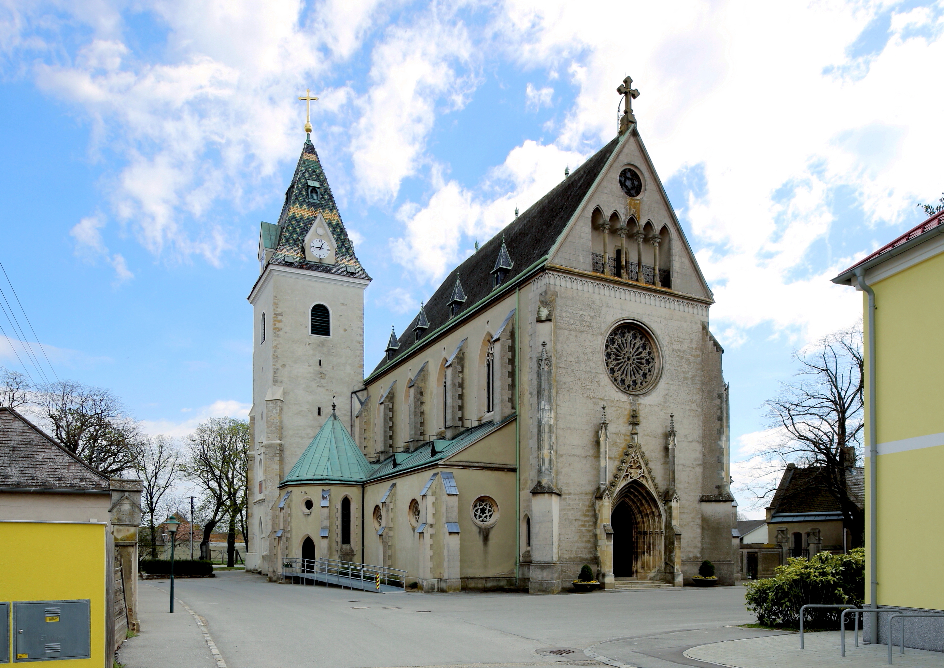 Westnordwestansicht der katholischen Pfarrkirche Mariae Himmelfahrt in der niederösterreichischen Marktgemeinde Großengersdorf. Der Chor mit 5/8-Schluß wurde Ende des 14. Jahrhunderts errichtet und das Untergeschoß des wuchtigen Nordturmes stammt aus dem 15. Jahrhundert. Das neogotische Langhaus wurde von 1897 bis 1901 nach Plänen des Architekten Eugen Schweigl errichtet.